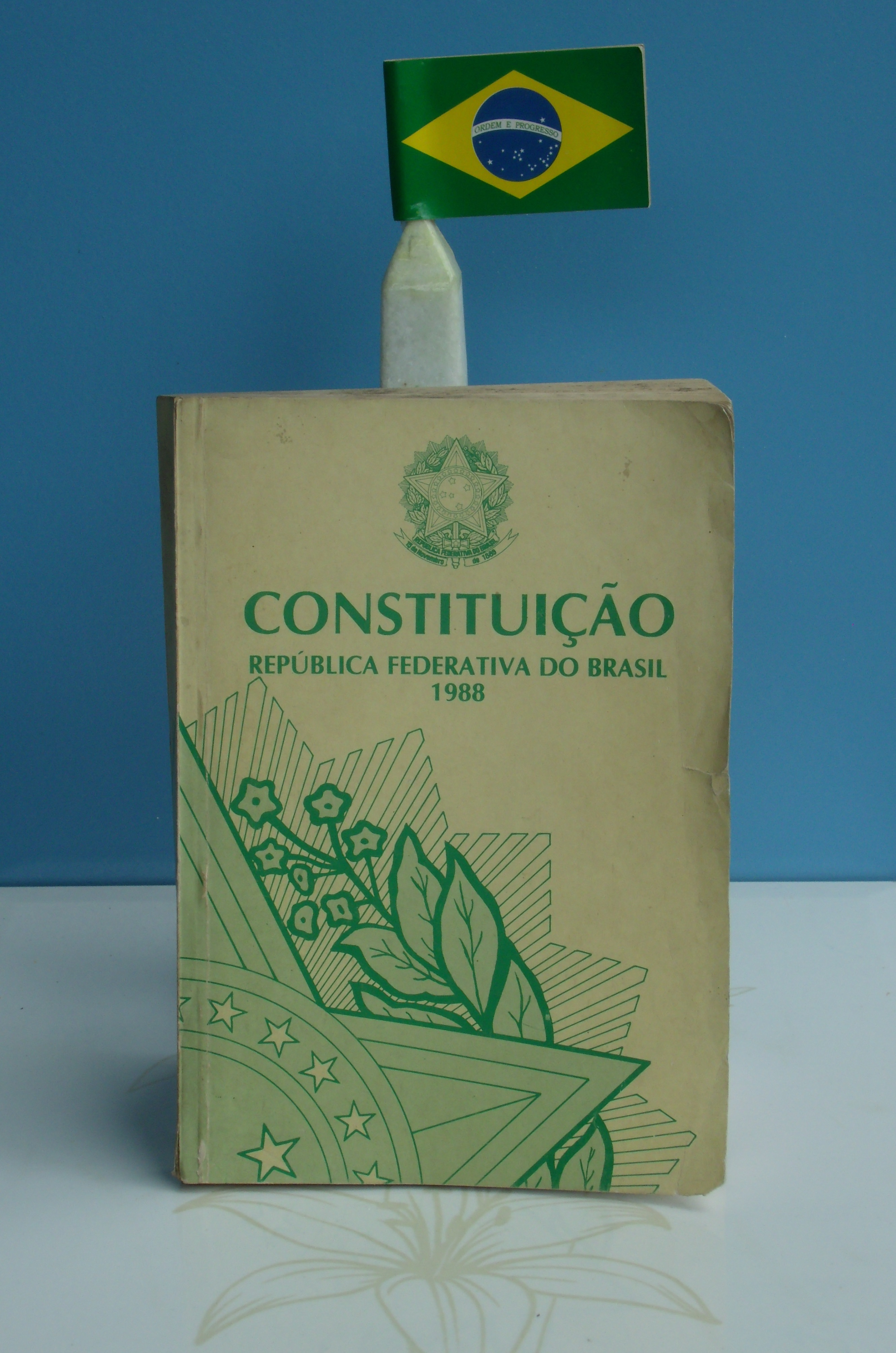 Constituição do Brasil de 1988 em exemplar distribuído pelo banco estatal Banco do Nordeste do Brasil.